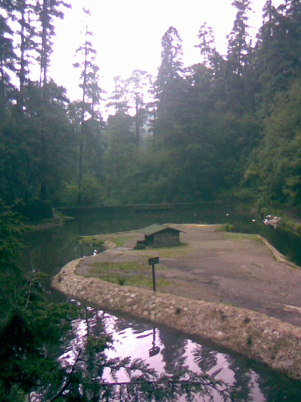 La casa de los patos esta localizada en la cañada del "Ex monasterio del Desierto de los Leones"